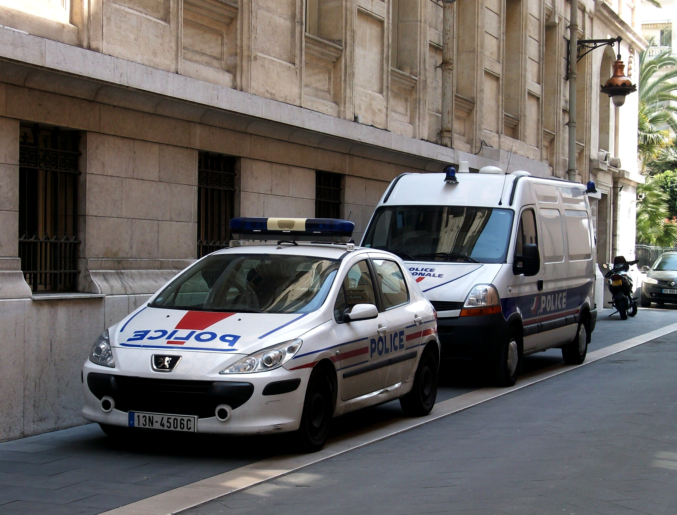 Véhicules de la police nationale stationnés le long du palais de justice de Nice